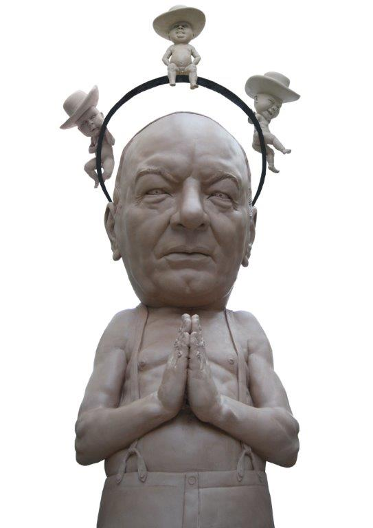 Skulptur des Hans Jakob in Hagnau/Bodensee